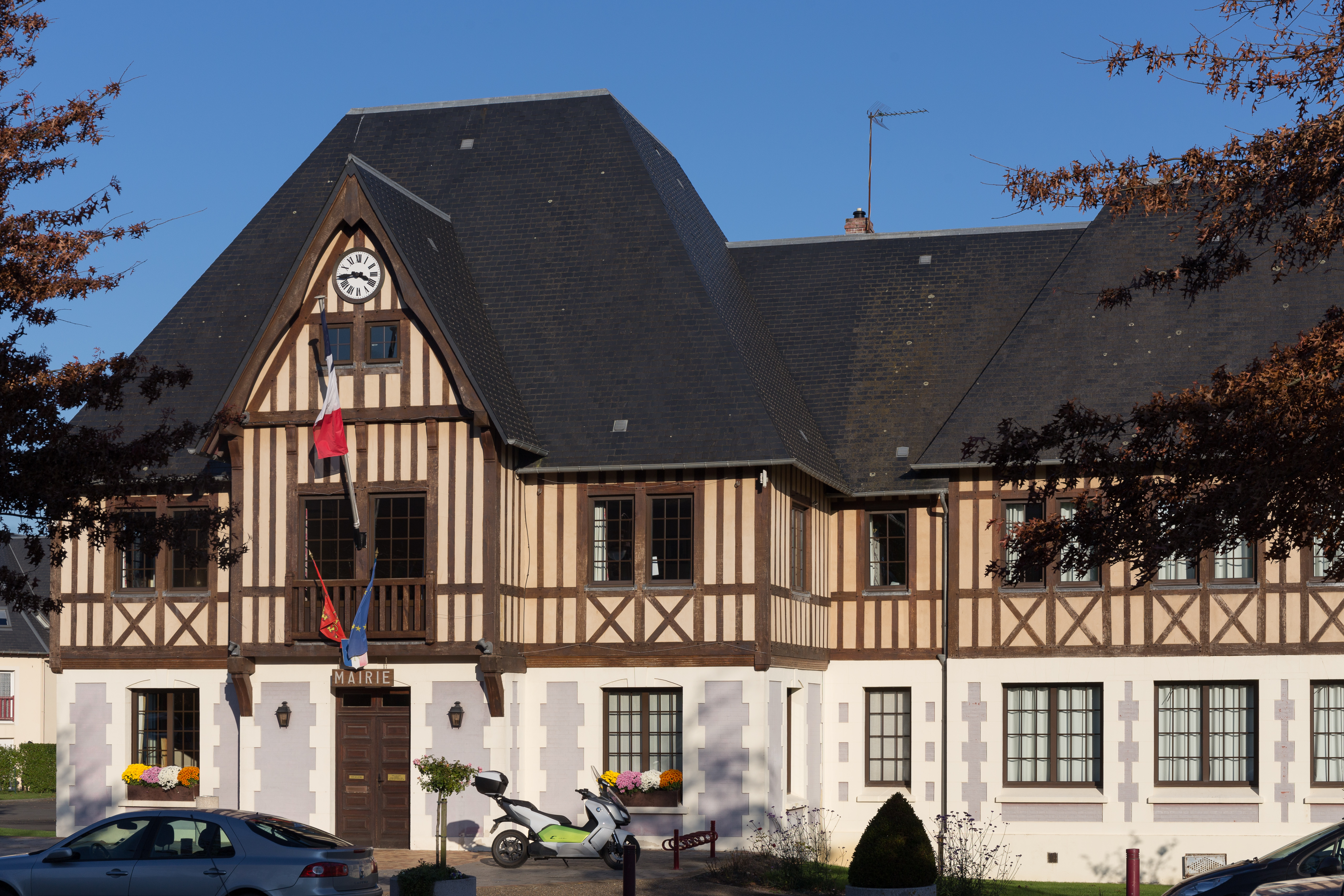 Mairie de Saint-Arnoult